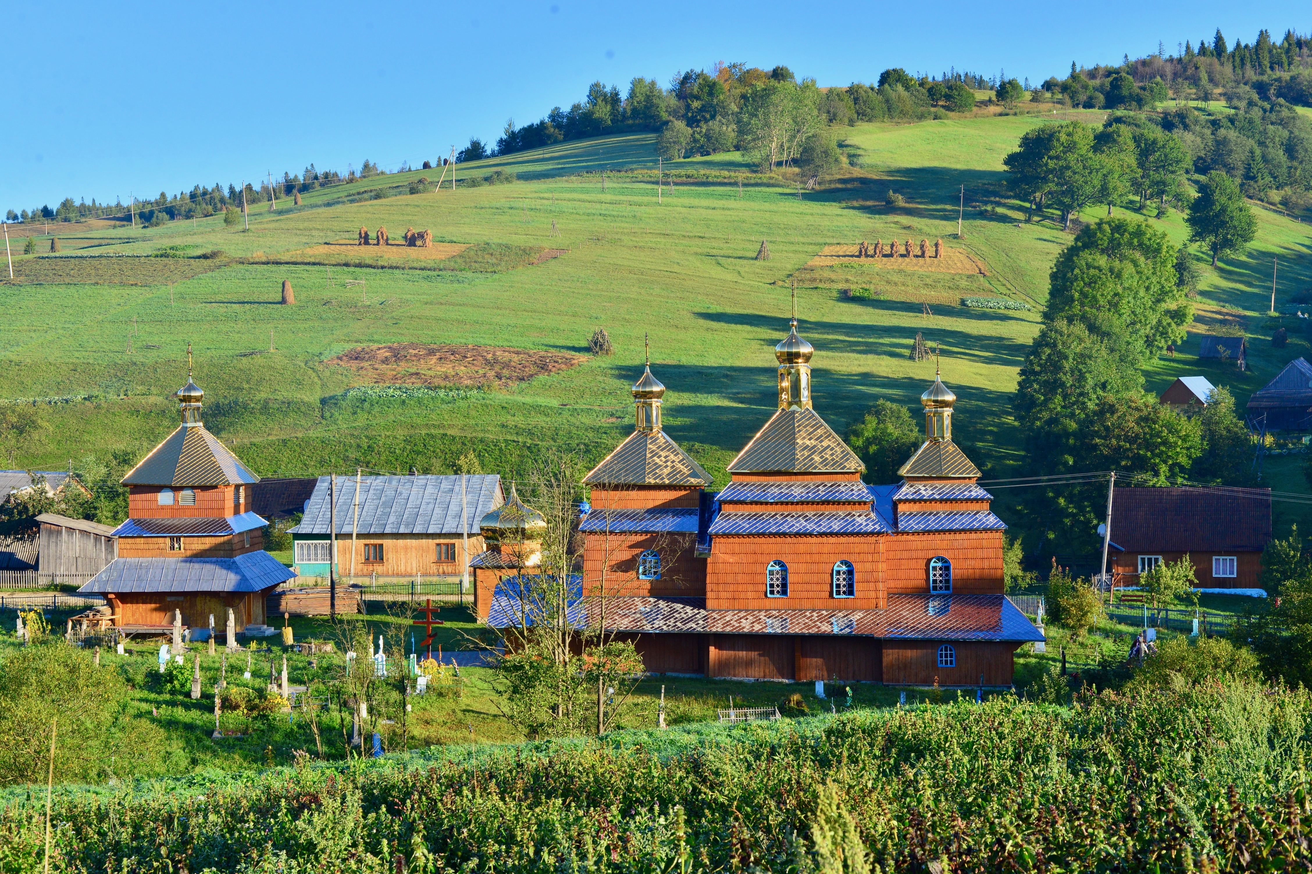 Cerkiew św. Michała Archanioła w Hnyłej